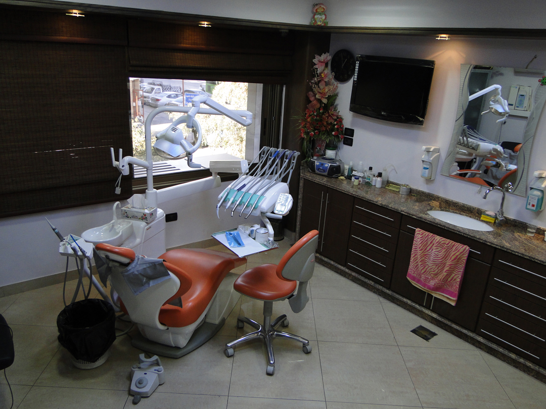 عيادة الأطفال مركز الدكتور رشاد مراد